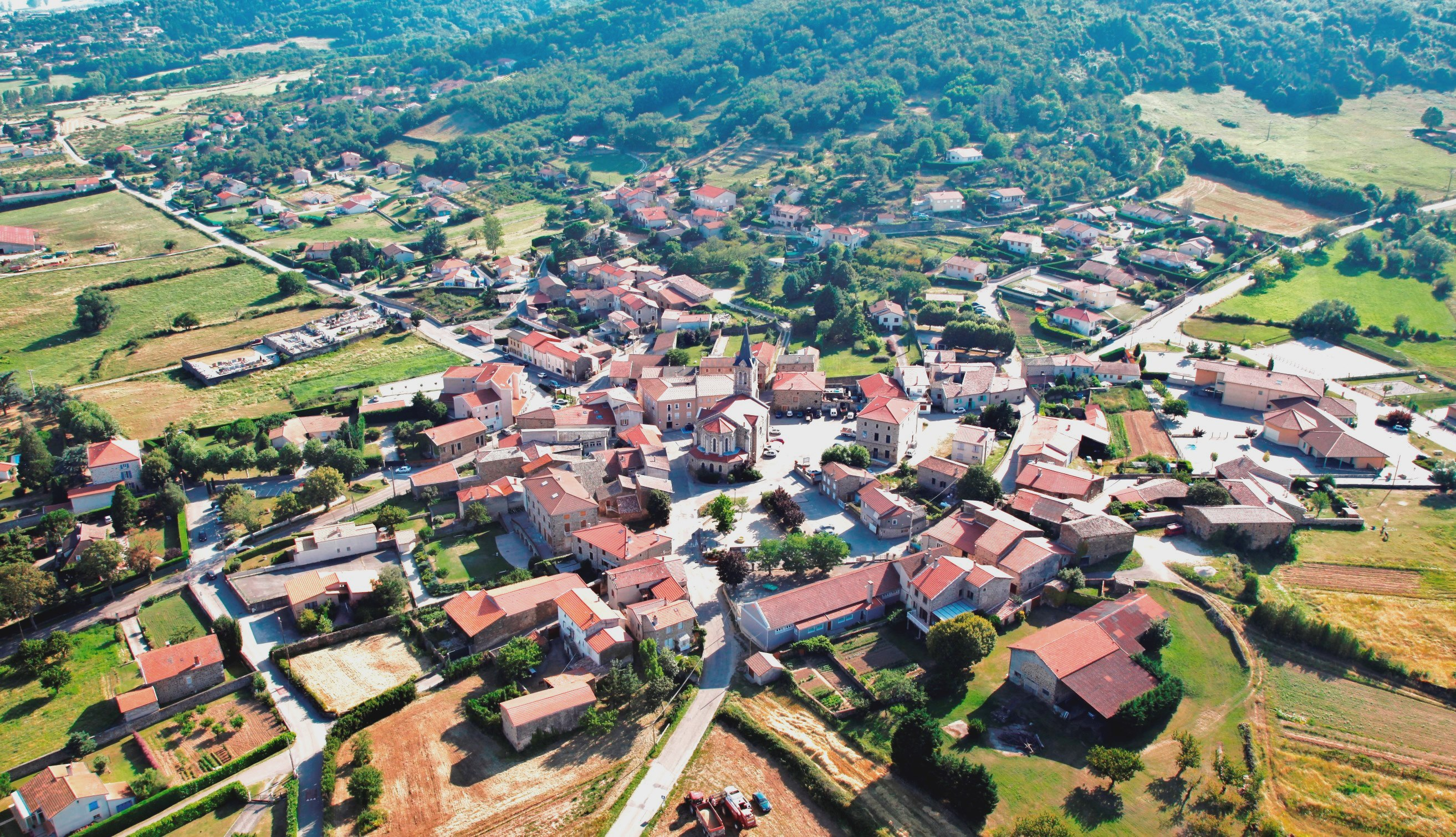 Félines détail